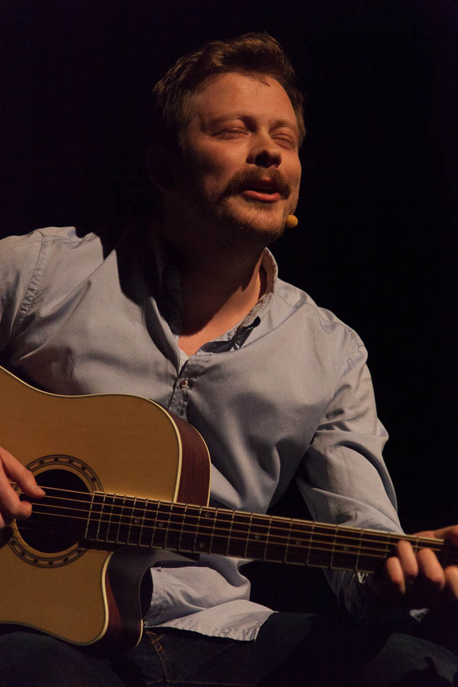 Nordiske Mediedager 2013